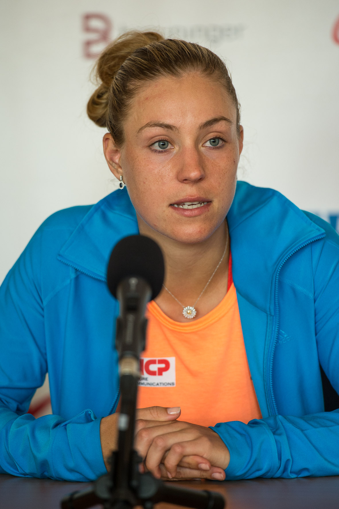 Angelique Kerber,Damentennis,Nürnberger Versicherungscup 2014,Tennis,WTA